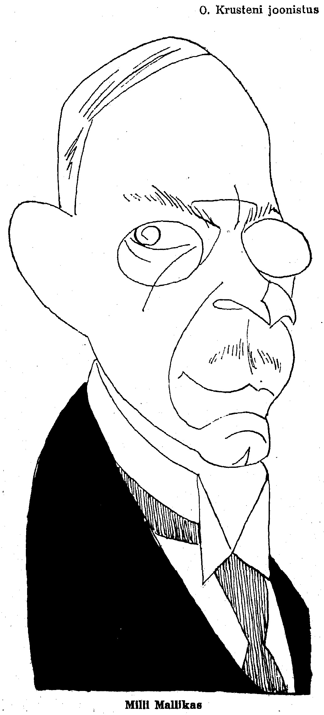 Otto Krusten šarž, Milli Mallikas